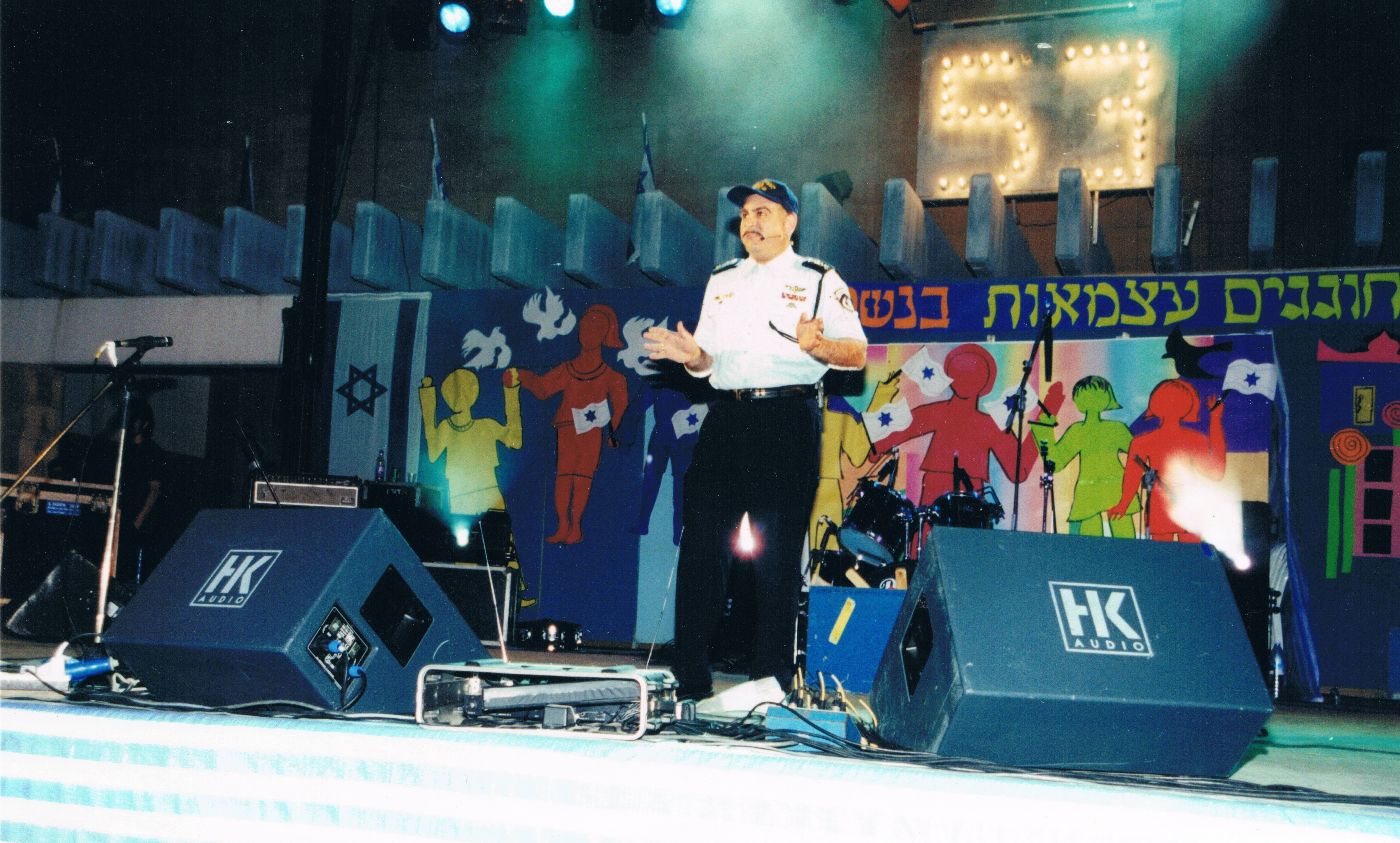 אלי יצפאן בימת יום העצמאות ה-53 בעיר נשר